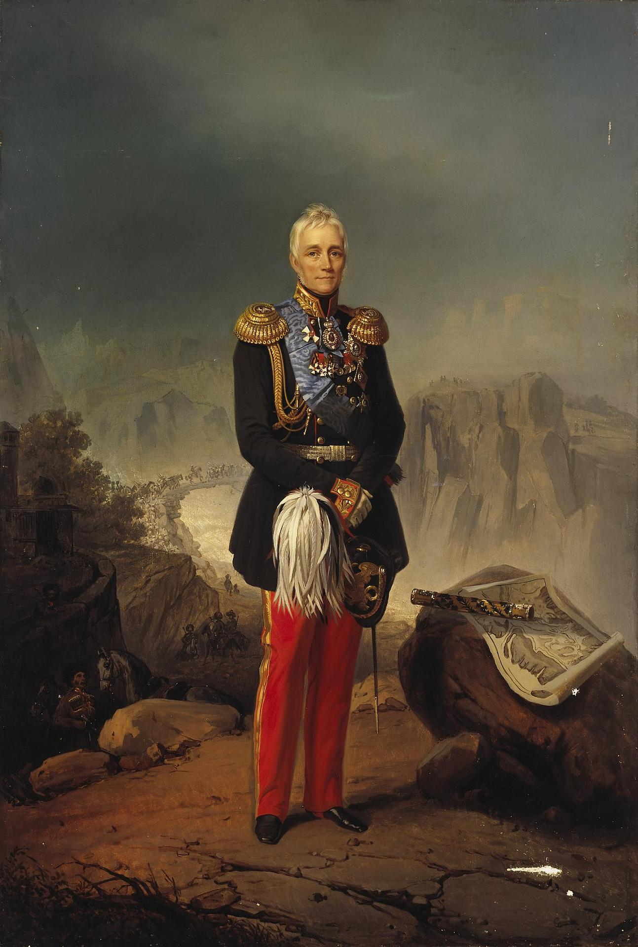 Великий князь Михаил Семёнович Воронцов. Данная картина (в чёрно-белом варианте) была использована в статье «Воронцов, Михаил Семенович, светлейший князь» опубликованной в шестом томе «Военной энциклопедии», который был издан книгоиздательским товариществом Ивана Дмитриевича Сытина в 1912 году в столице Российской империи городе Санкт-Петербурге.